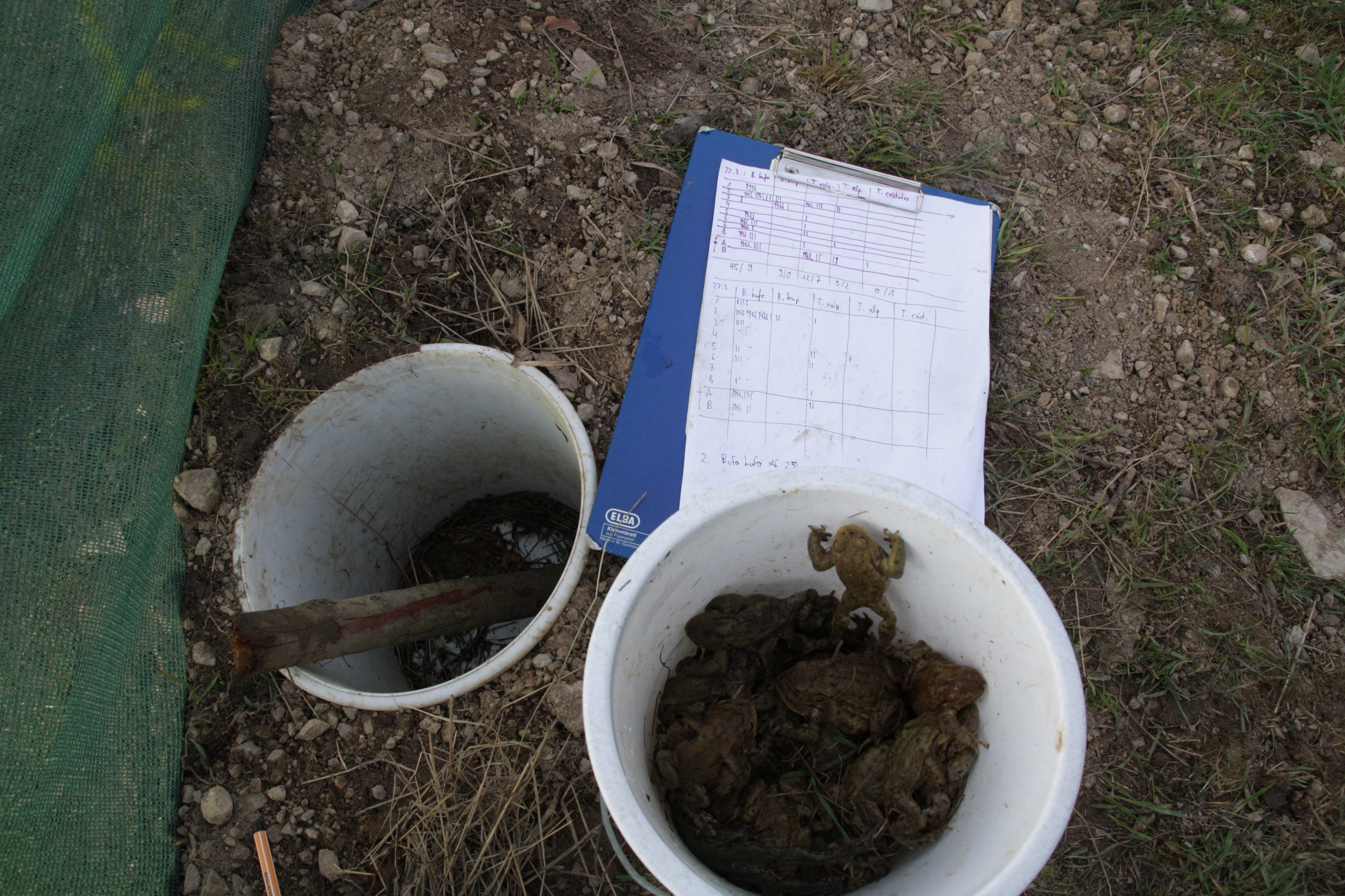 Betreuung am Amphibienzaun: Ganz links ist der Zaun zu sehen, mit eingelassenem Eimer. Der Stock im Einer dient zur besseren Auffindbarkeit desselben, sowie als Kletterhilfe für versehentlich eingefangene Nagetiere (Kröten klettern im Allgemeinen nicht an Stöcken hoch). Rechts daneben ist der Eimer mit bereits eingesammelten Tieren zu sehen; oberhalb davon die Liste zur Erfassung der Individuen.